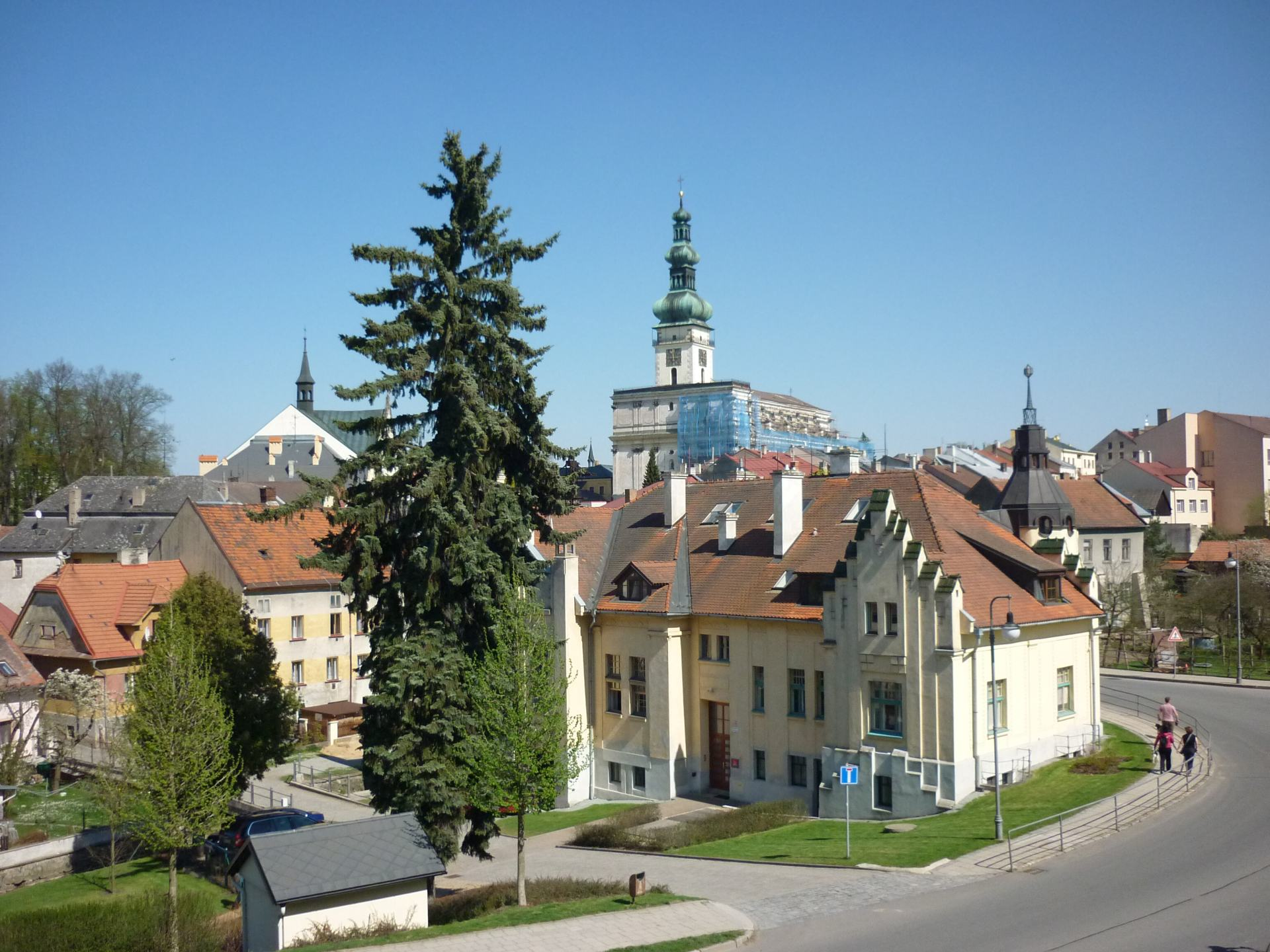 Polná - náměstí a pamětihodnosti